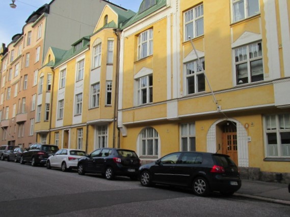 Huvilakatu